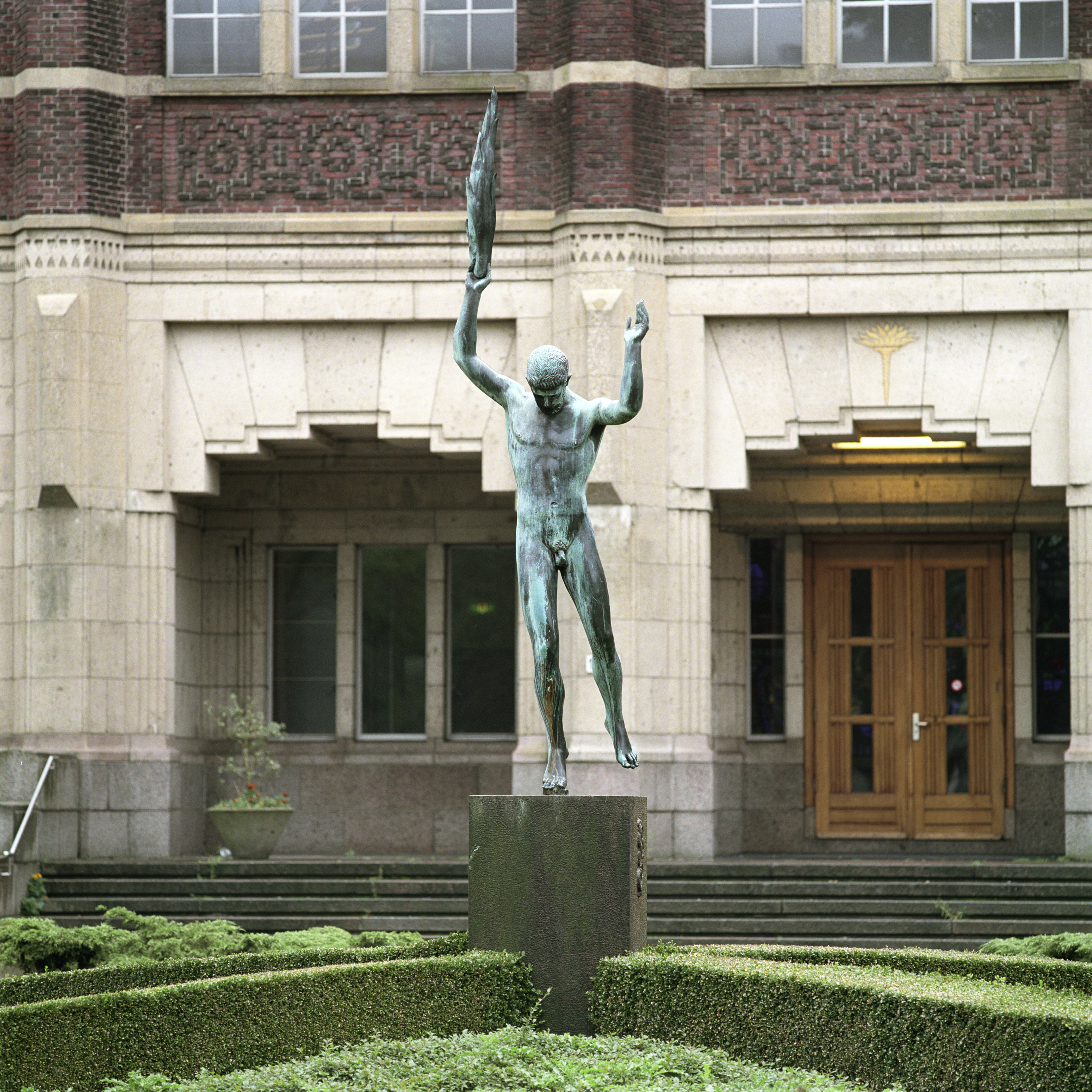 Rode Scheikunde: Sokkel met het beeld van Prometheus, uit 1953, vervaardigd door prof. L.O. Wenckebach, staat op het voorplein, voor de centrale entree